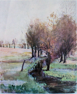 Die Malerin Louise Pagenkopf lebte von 1856 bis 1922. Ihr Aquarell April gilt nach zeitgenössischen Rezensionen als stilprägend für die Malerin.